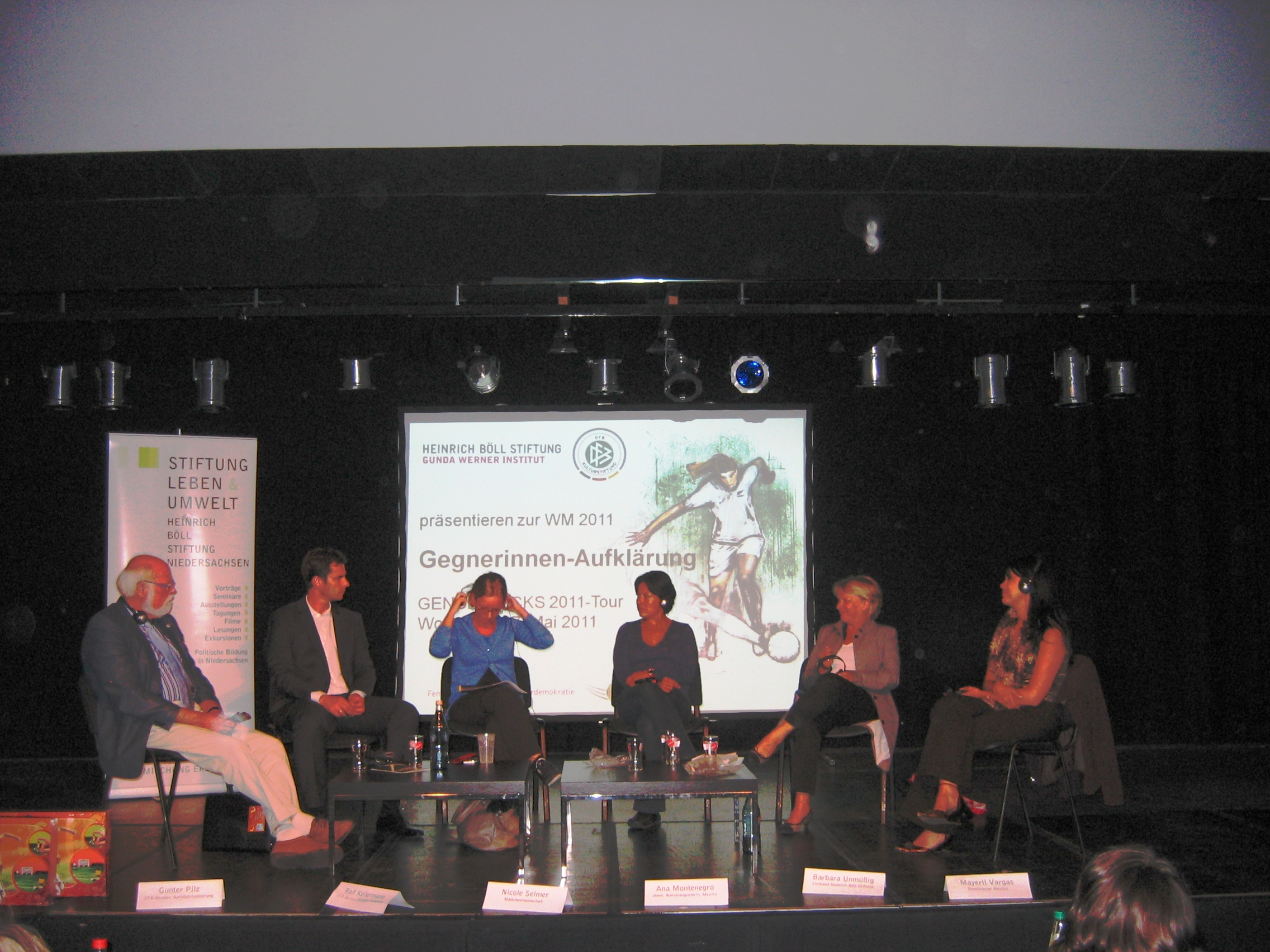 Prof. Dr. Gunter Pilz (DFB-Berater zum Thema Anti-Diskriminierung) Ralf Kellermann (Trainer der Wölfinnen, VfL Wolfsburg) Nicole Selmer (Fußball-Reporterin der Mädchenmannschaft und Expertin zu Frauen als Fußballfans, Autorin von „Gender Kicks“ und „Wachting the Boys Play“) Ana Montenegro (ehm. mexikanische Nationalspielerin) Barbara Unmüßig (Vorstand Heinrich-Böll-Stiftung) Mayerli Vargas (Street Soccer Mexiko) (v.l.n.r.) Foto: Gunda-Werner-Institut